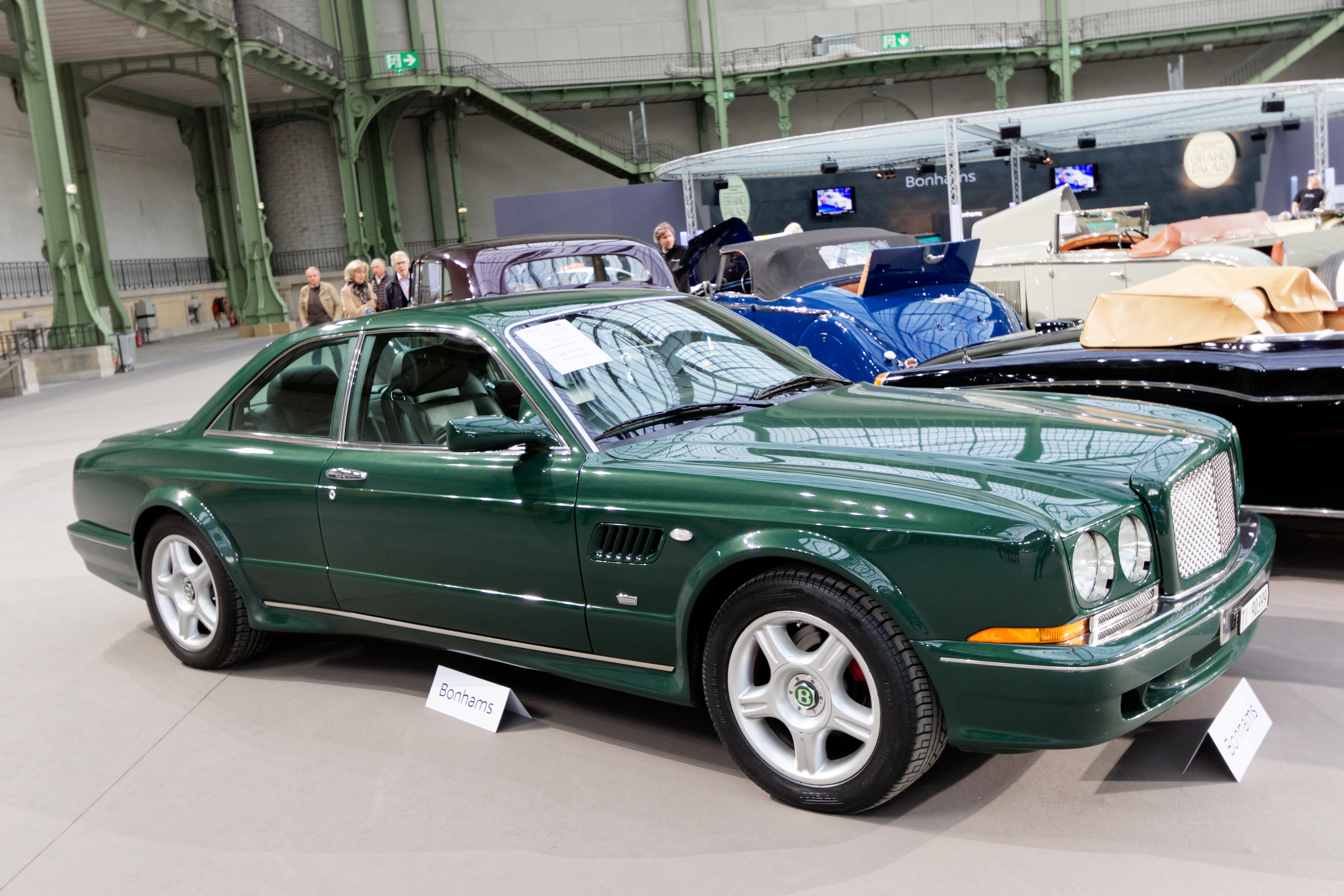 Un des véhicules présenté lors de la vente aux enchères Bonhams 2017 au Grand Palais de Paris.